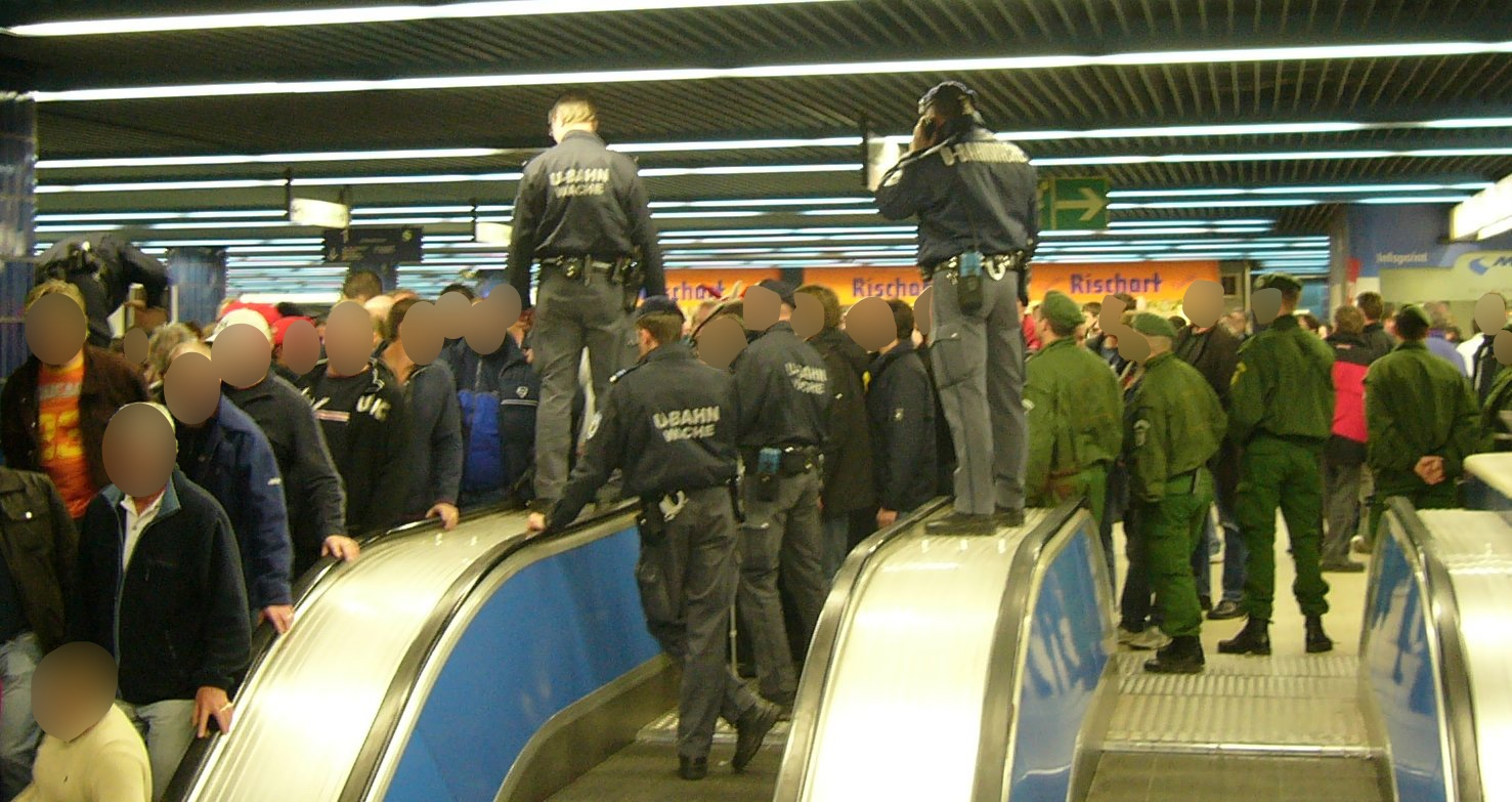 U-Bahn-Wache und BGS beim Fußballeinsatz am Marienplatz in München